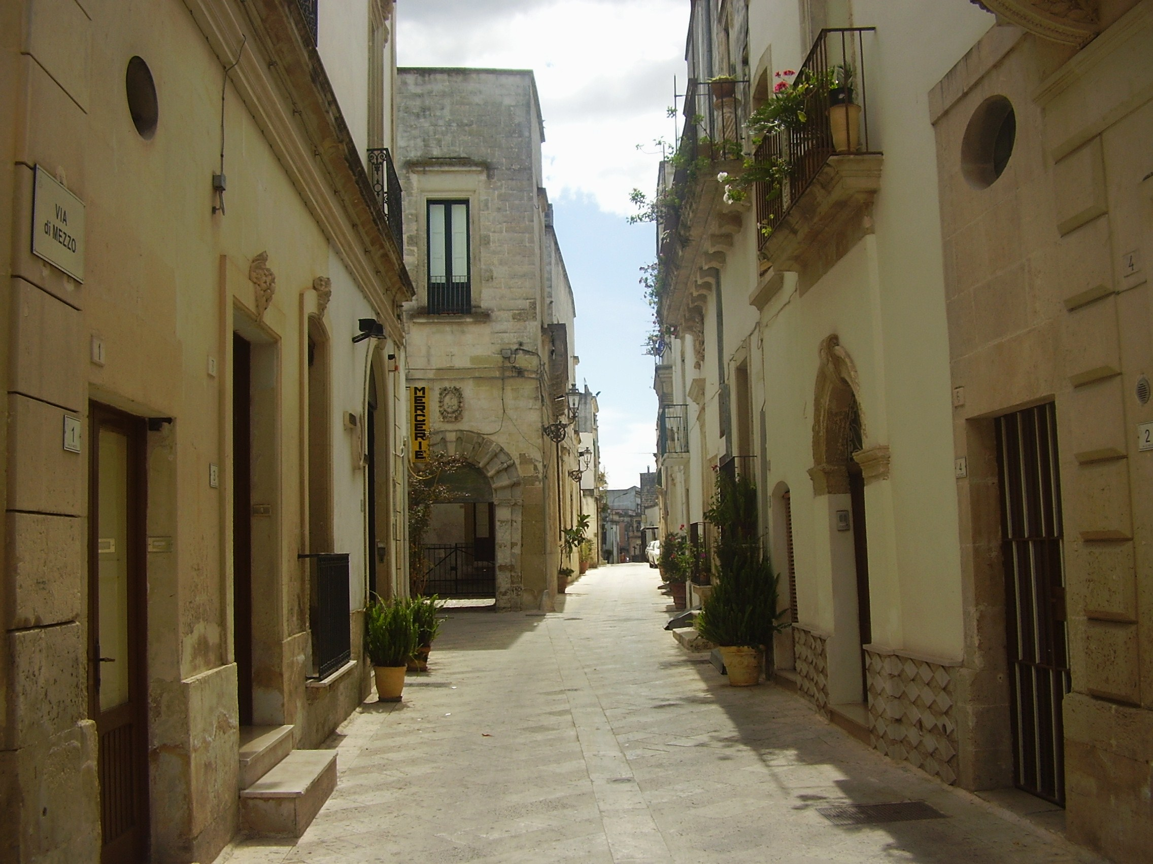 Centro storico di Poggiardo